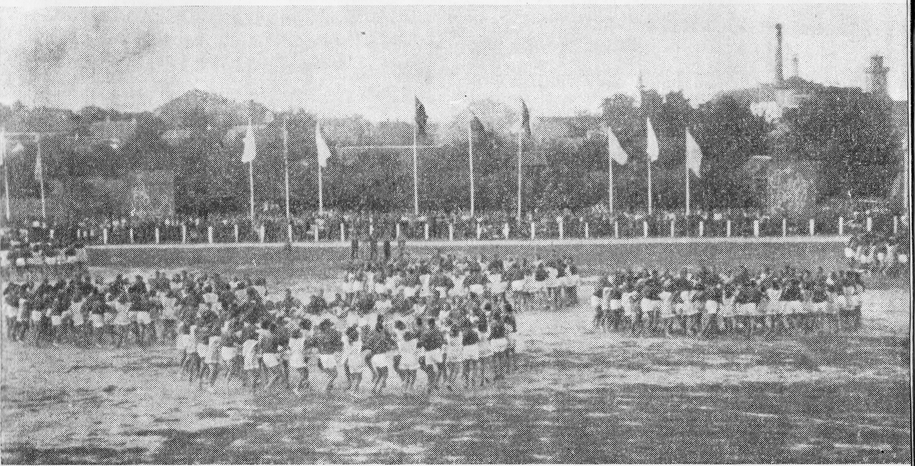 Srpski (latinica): Vreme fiskulture omladinskih radnika. Izgradnja Novog Beograda (1948-1950)